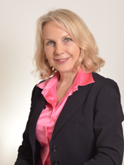 Julia Unterberger, politica italiana